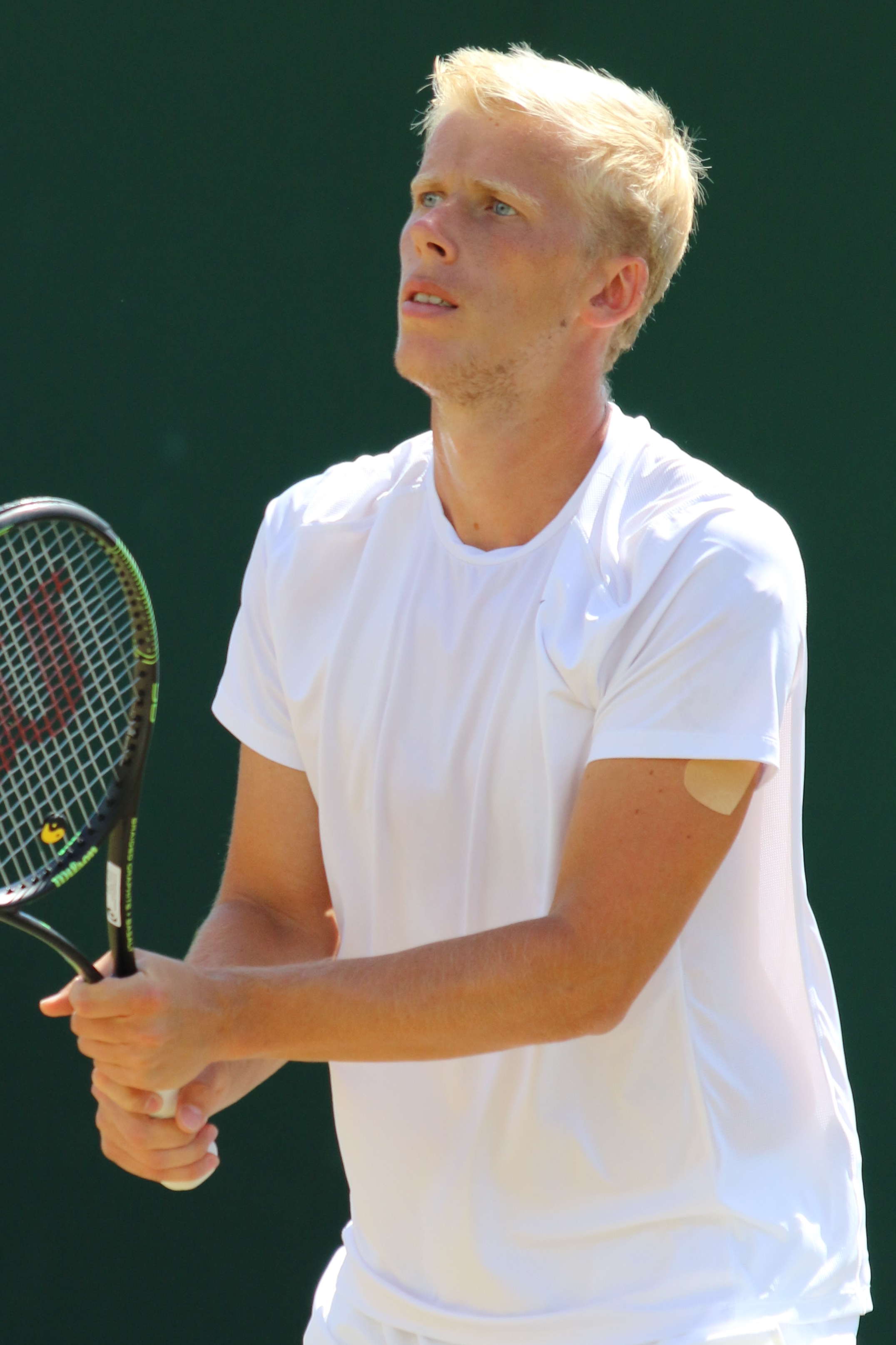 Vasilevski WM17 (21)